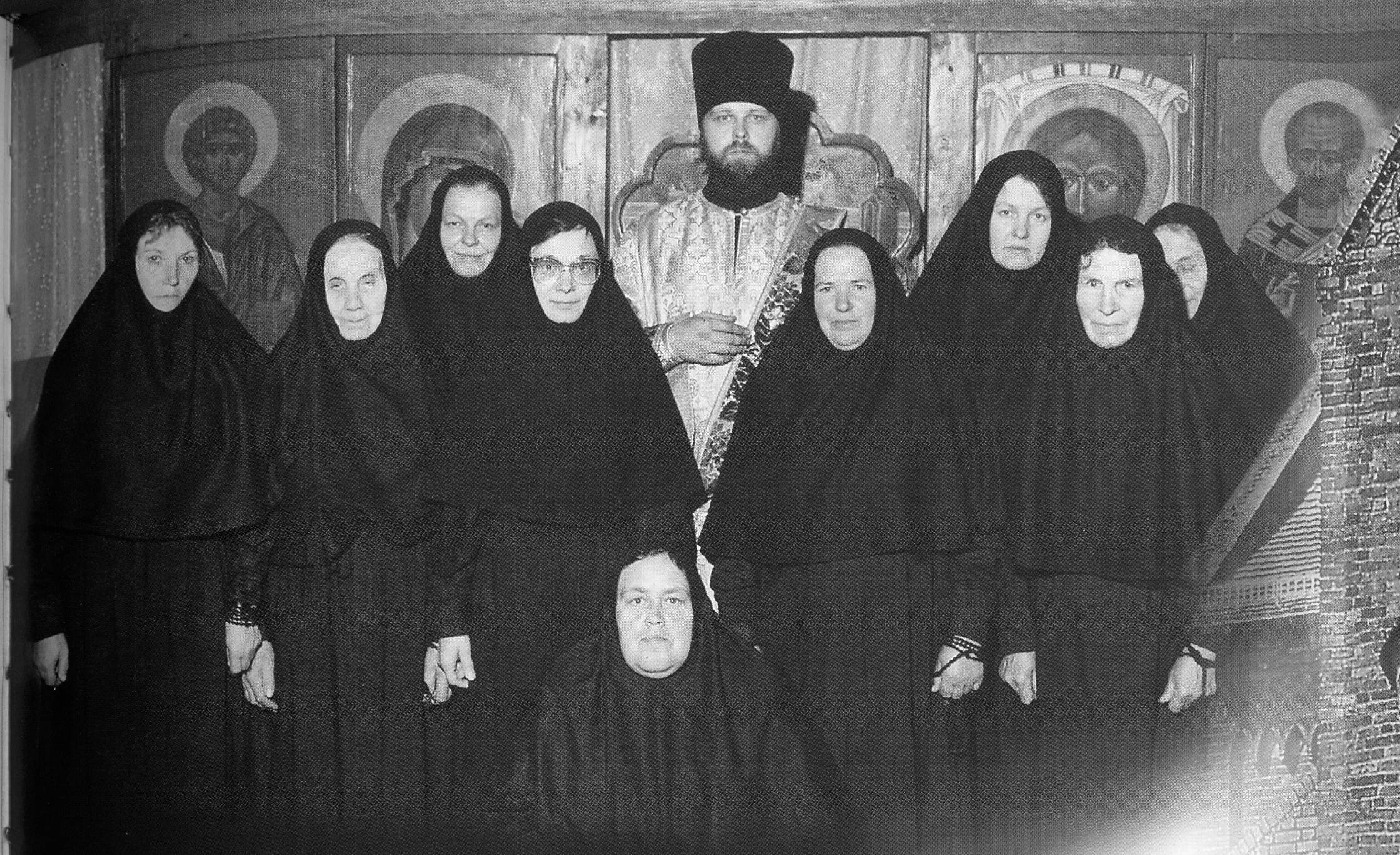 Свято-Никольский монастырь в Клининграде. Первые инокини. иеродиакон Меркурий (Иванов)